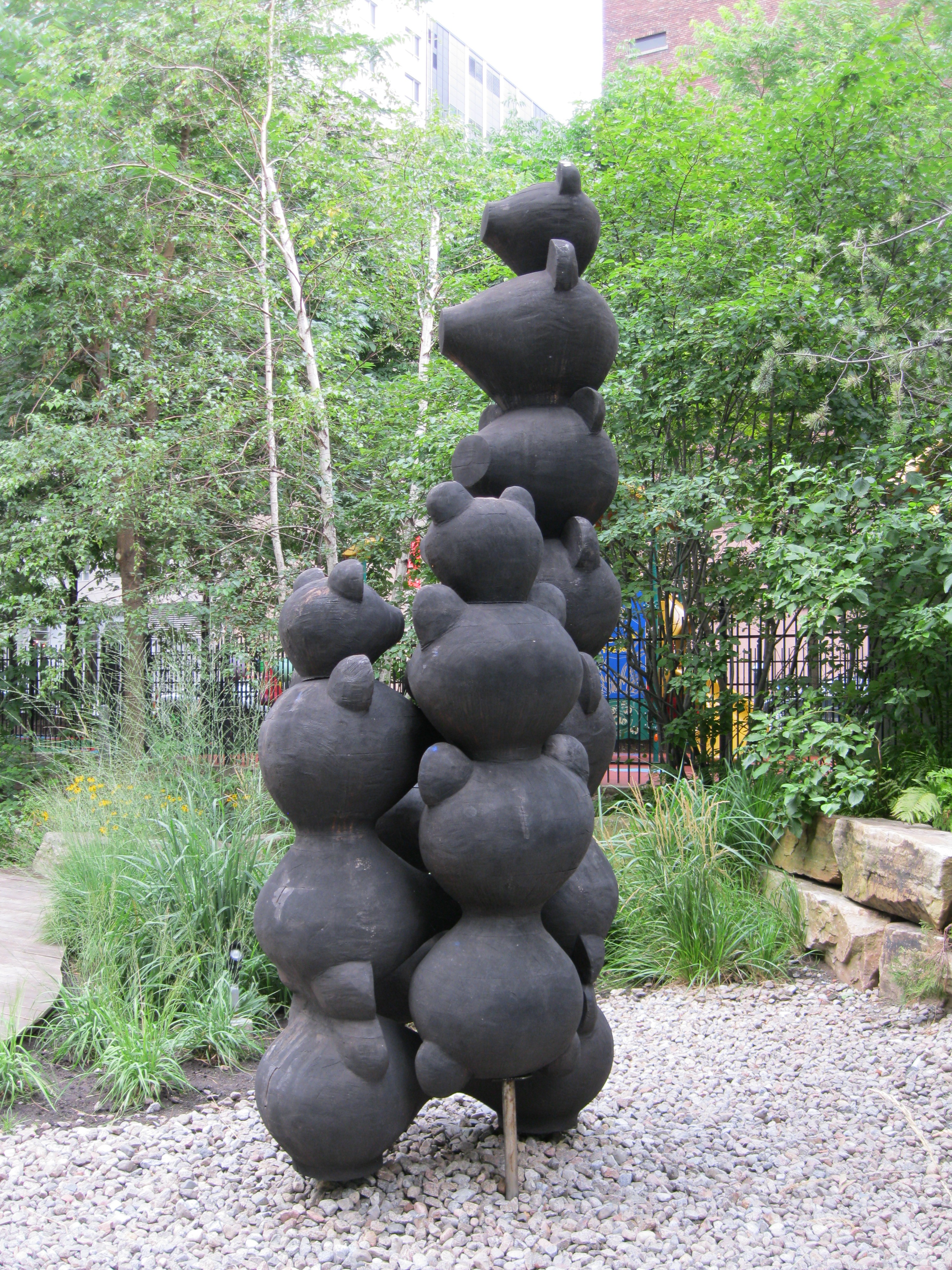 Écho est une sculpture en bois, de forme totémique et contenant des ours, réalisée par Michel Saulnier. Elle est installée au Jardin de la Domtar, derrière la sortie De Bleury Nord de la station Place-des-Arts du métro de Montréal. Métro de Montréal : oeuvres associées Michel Saulnier